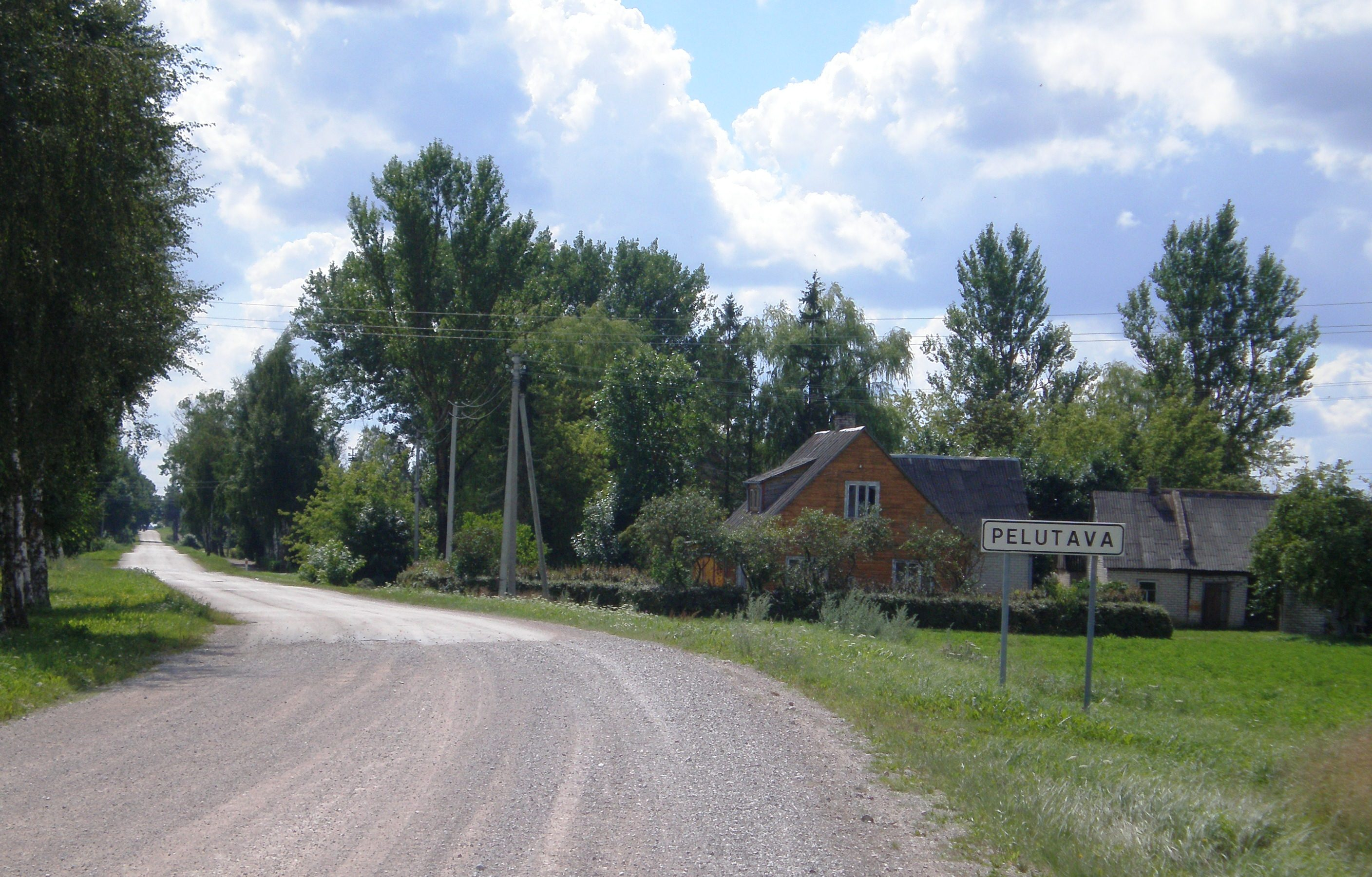 Pelutava, Kėdainių raj.